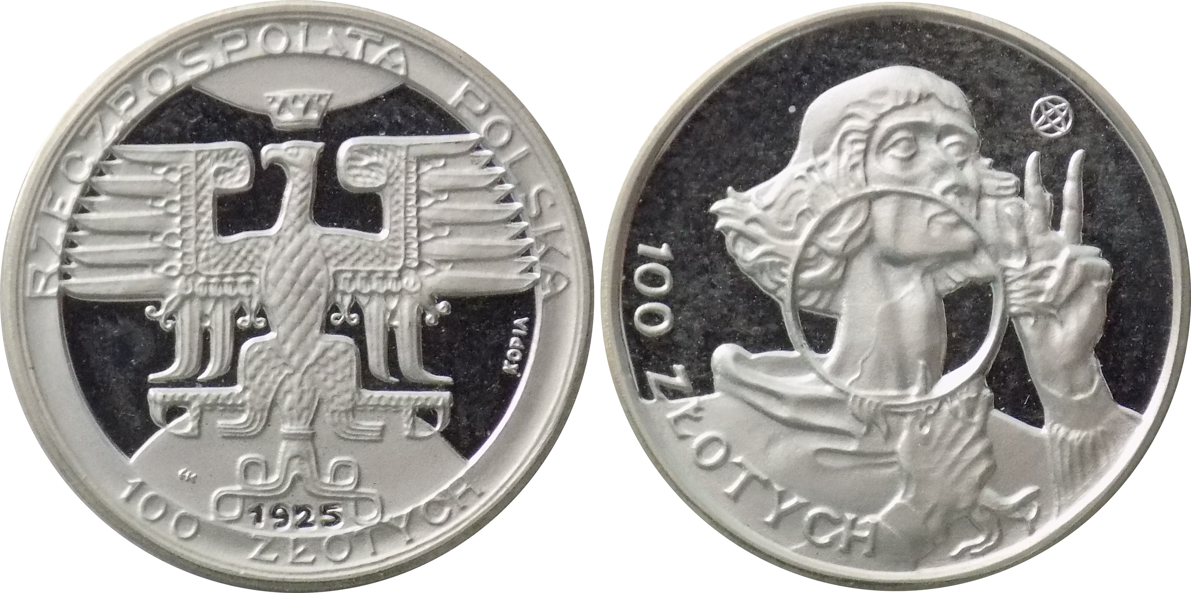 Replika 100 złotych 1925 Mikołaj Kopernik 20.5 mm srebro